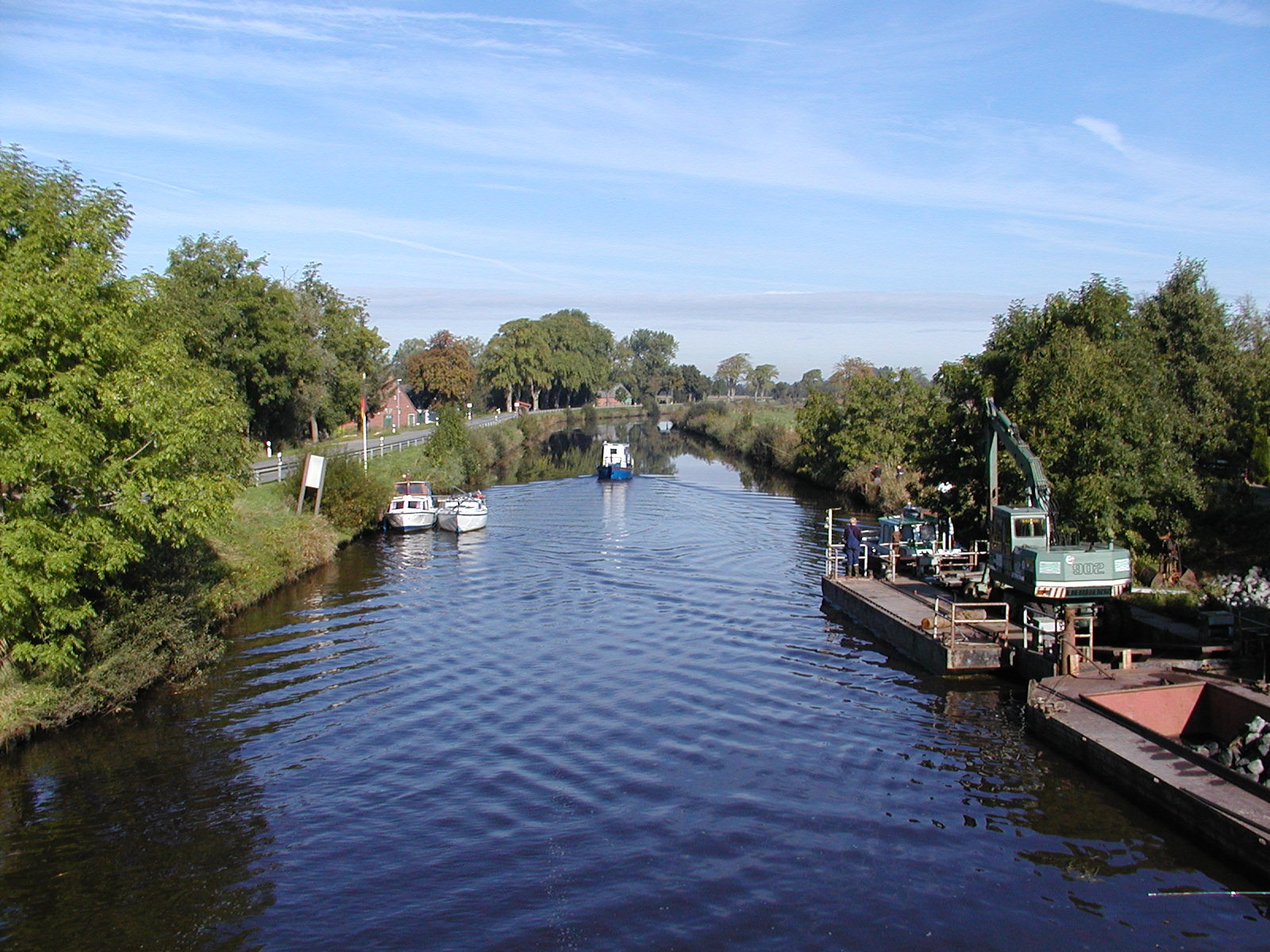 Der Hadlerkanal in Osten Richtung Nord